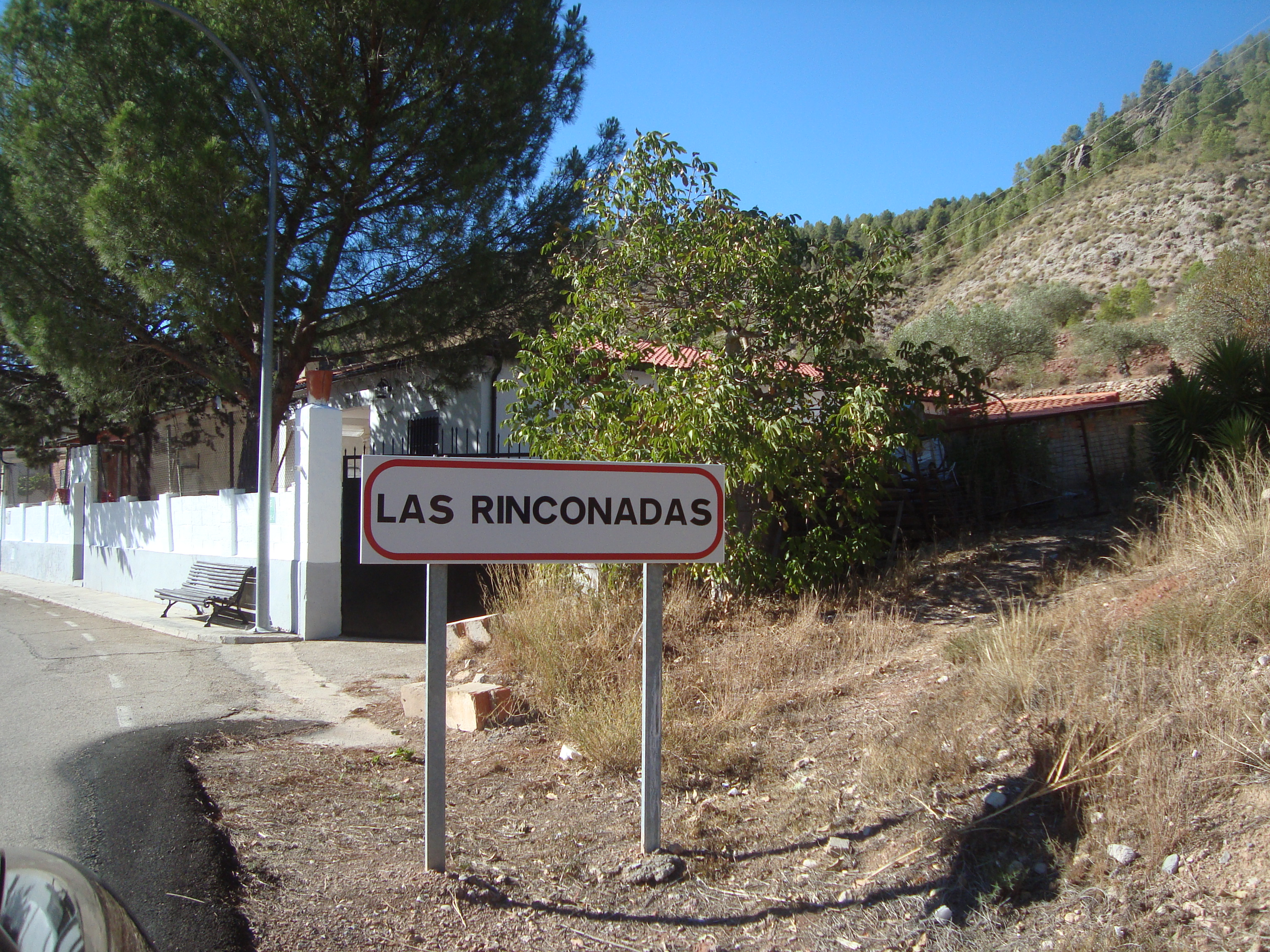 Las Rinconadas es una aldea de la comunidad de Castilla -La Mancha, perteneciente al municipio de Santa Cruz de Moya, ubicada en la provincia de Cuenca, España.